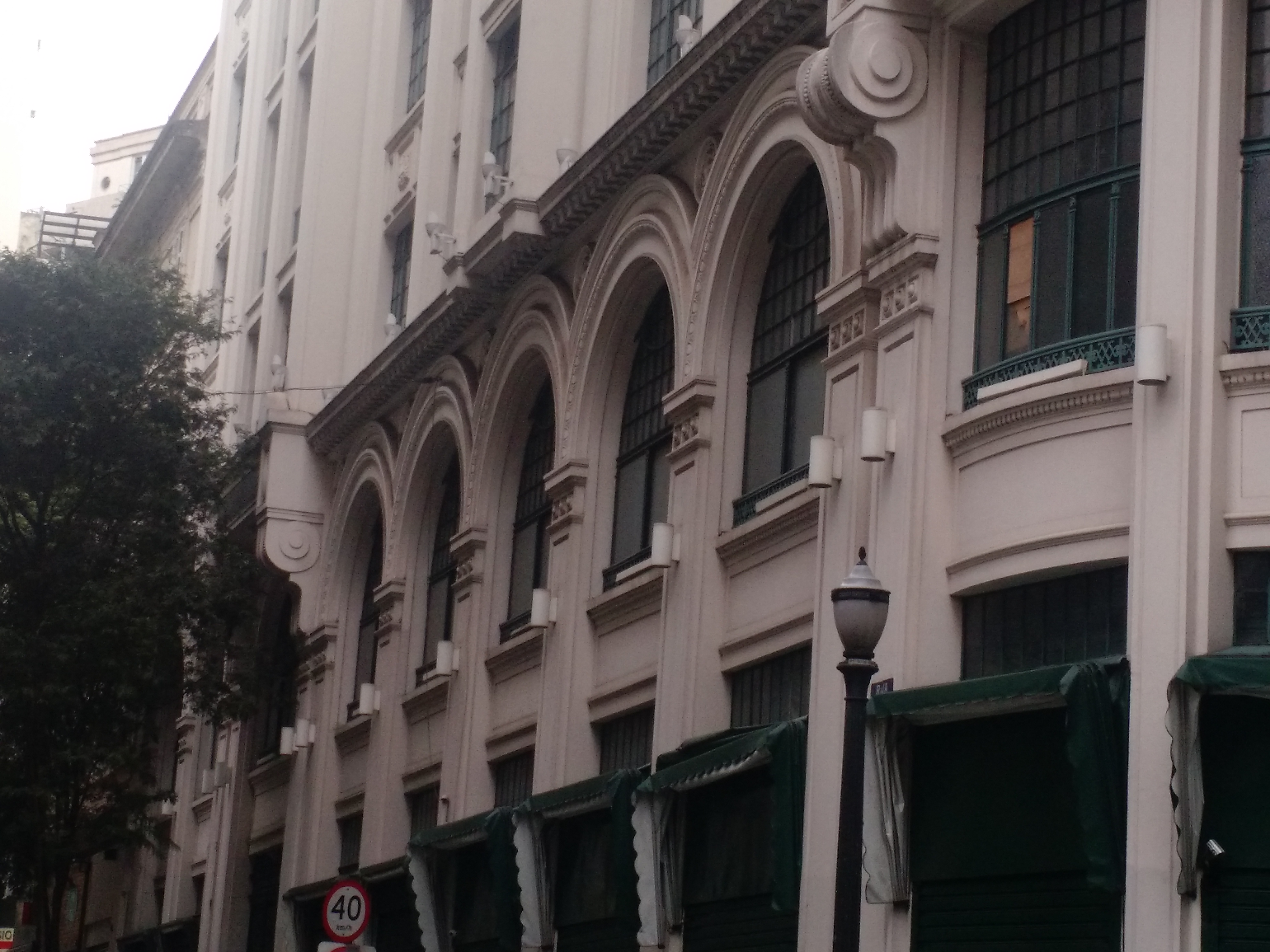 Fechada lateral do Edifício Casa das Arcadas, na Sé, em São Paulo - SP - Brasil